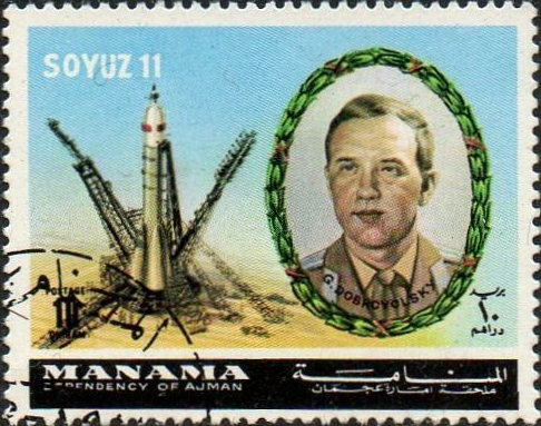 Georgy Dobrovolsky